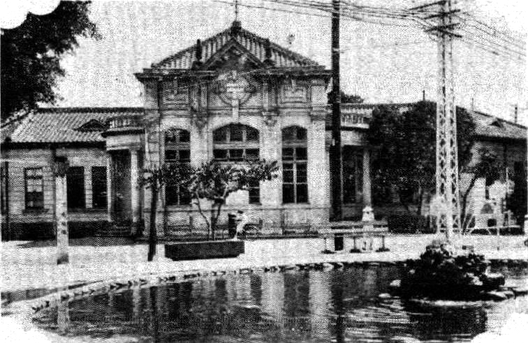 中文（台灣）: 位於中央噴水池旁的嘉義郵便局